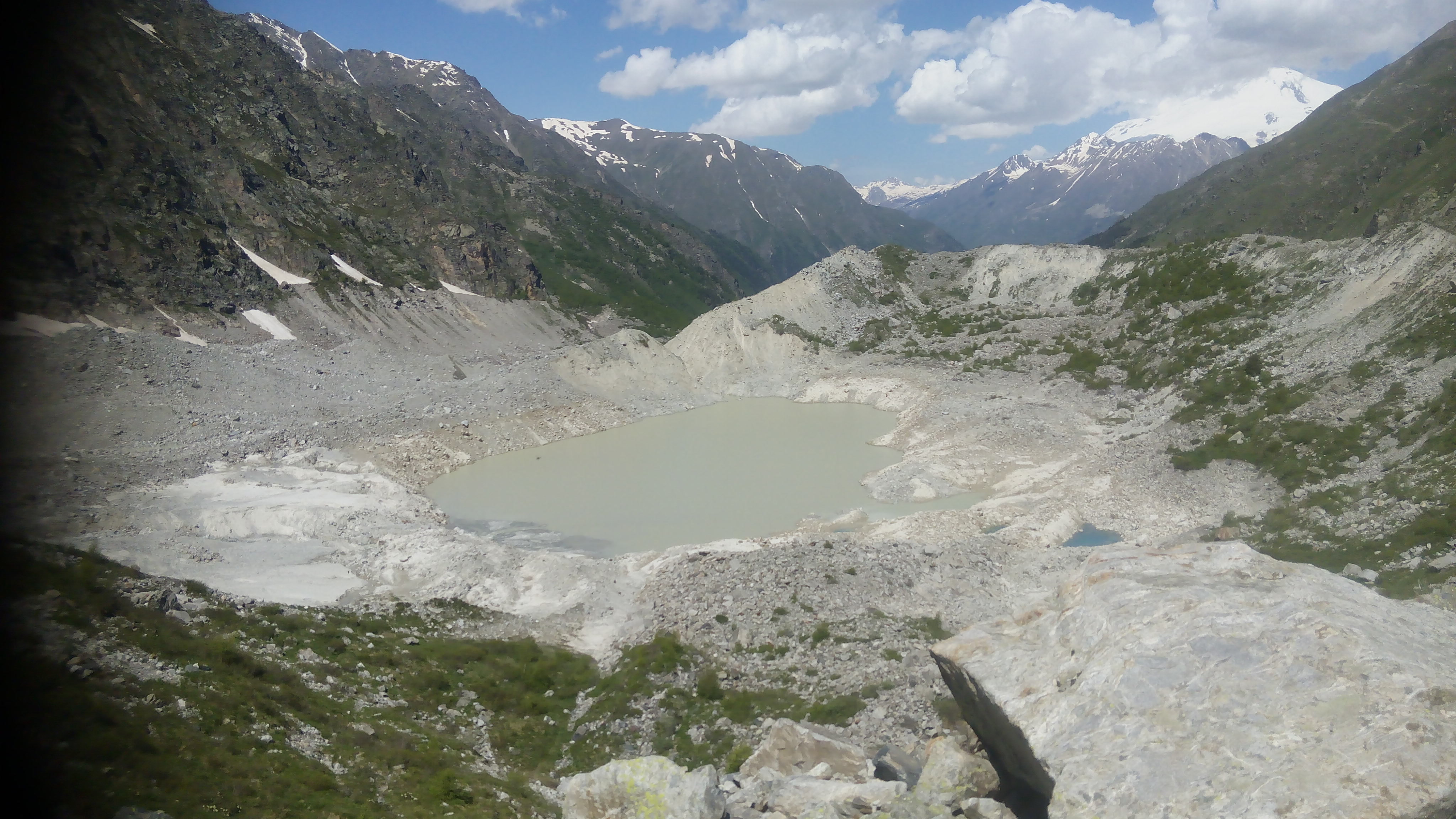 озеро Башкара